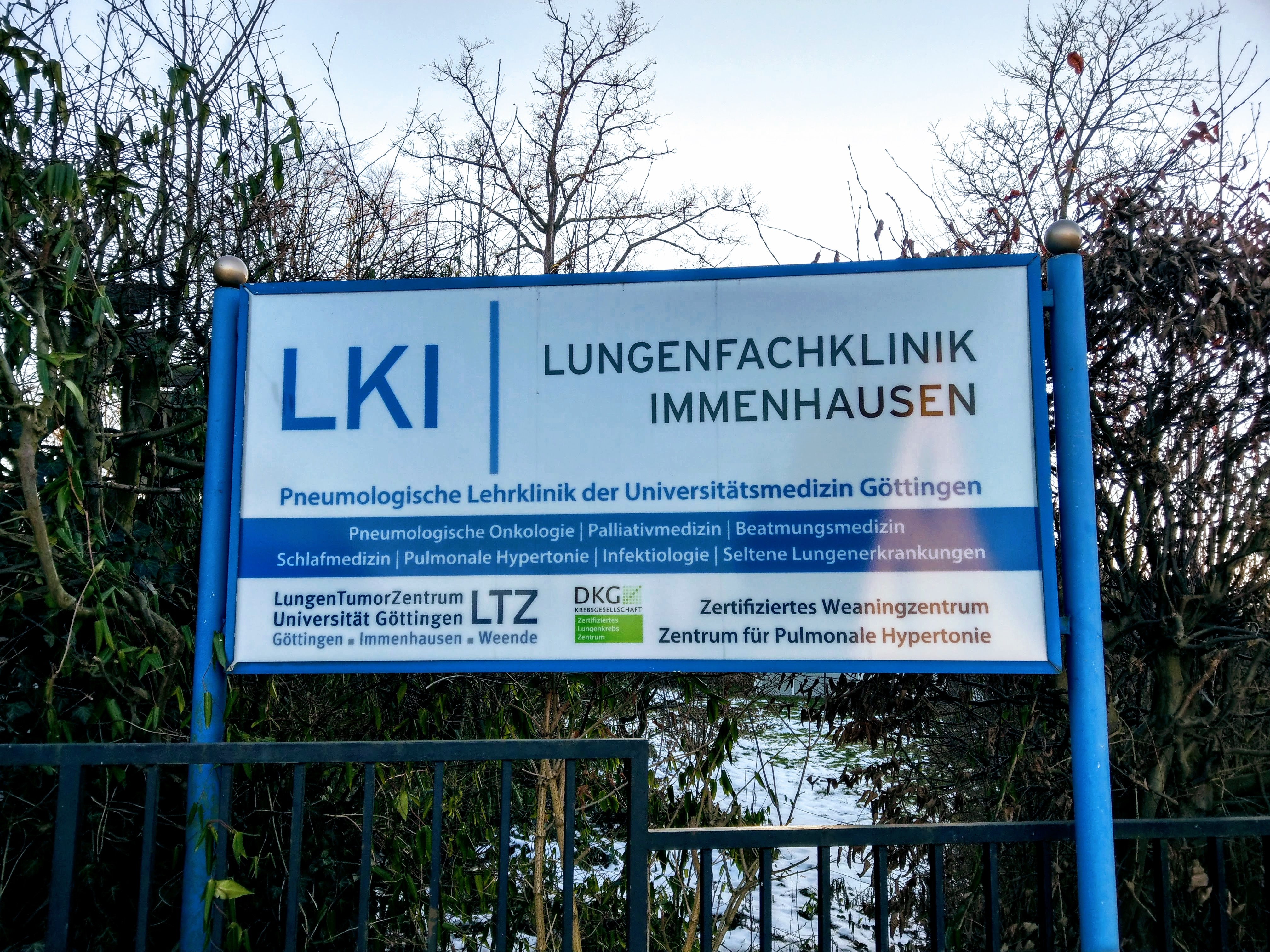 Foto des öffentlichen Eingsangsschild der Lungenfachklinik Immenhausen